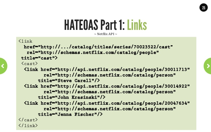 HATEOAS